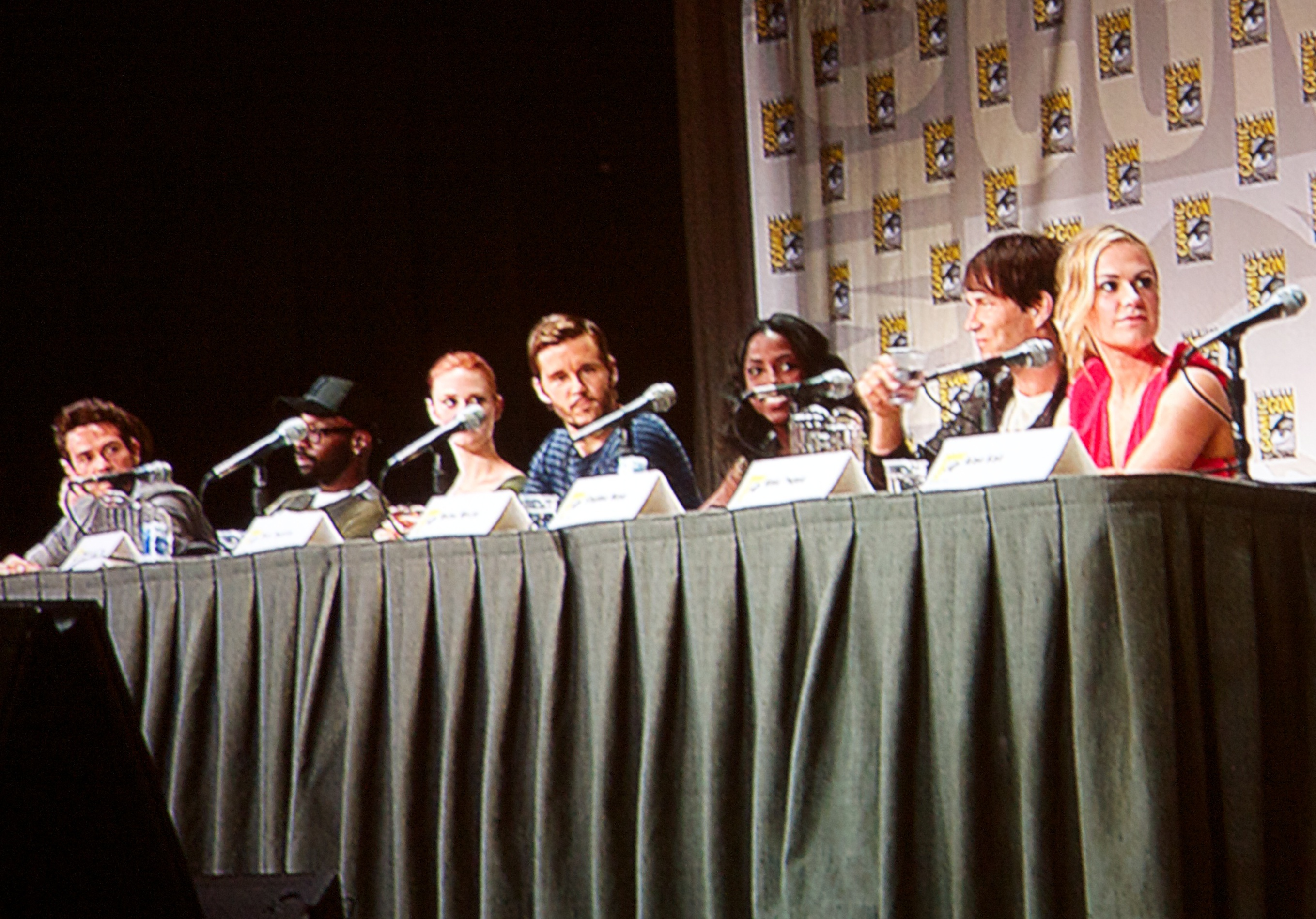 True Blood panel at 2011 International Comic-Con San Diego